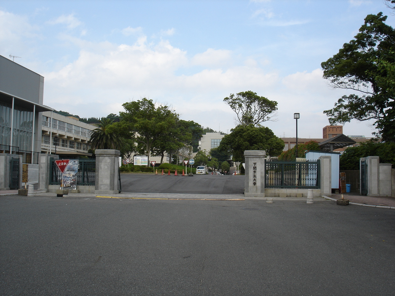 下関市立大学 （2007年7月1日、Wiki708撮影 Category:下関市の画像）